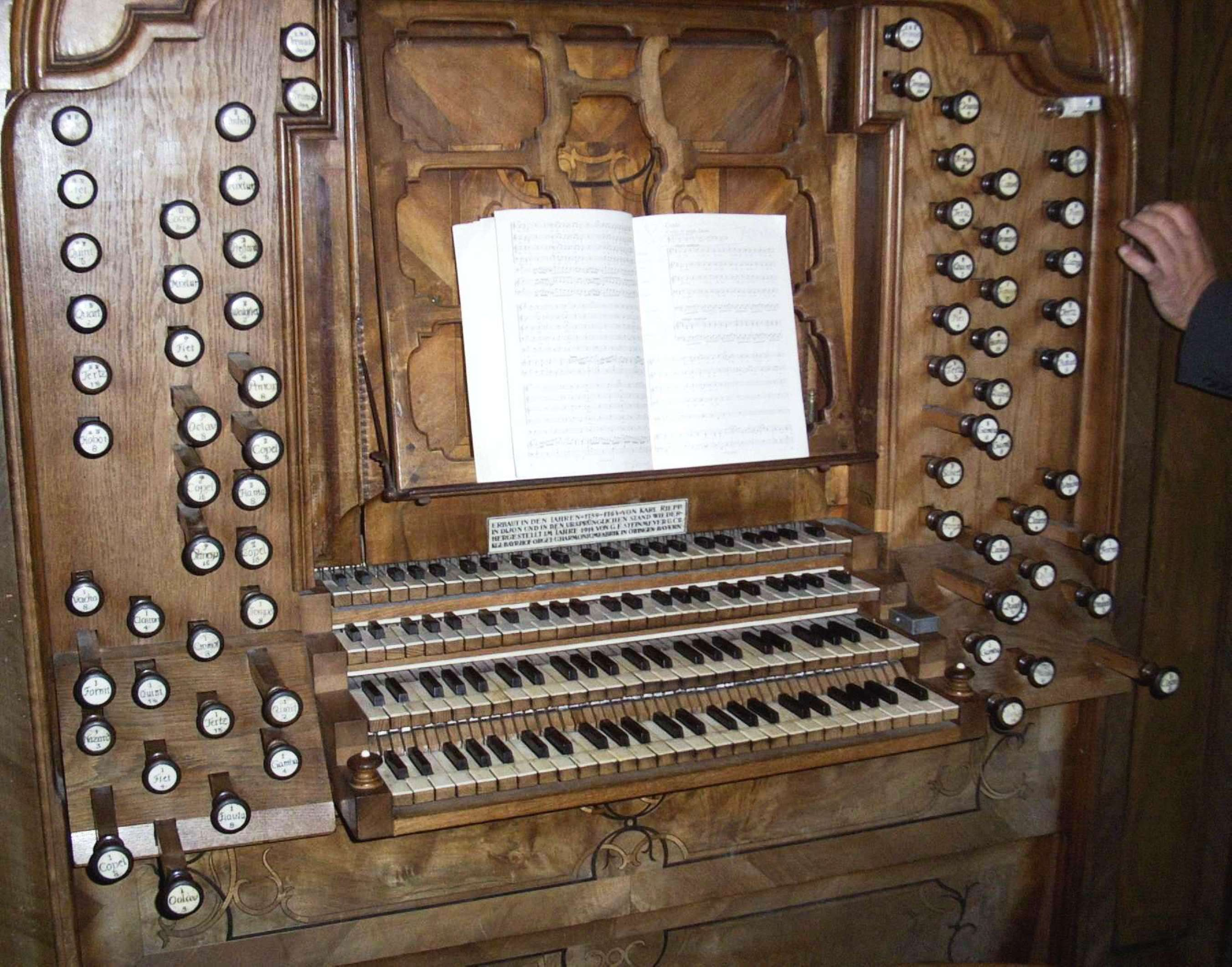 Spieltisch der großen Riepp-Orgel in Ottobeuren